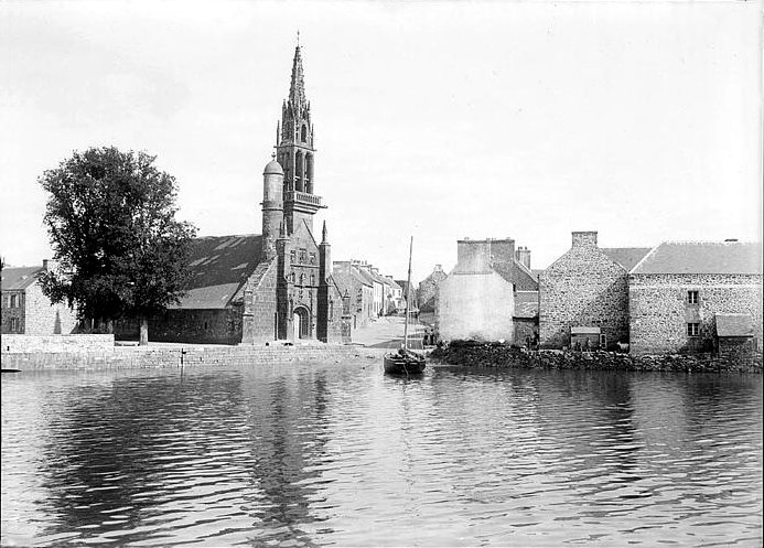 L'Hopital-Camfrout en 1901 (photo de Lucien Roy, Société Française d'Archéologie ; Ministère de la Culture (France) - Médiathèque de l'architecture et du patrimoine)